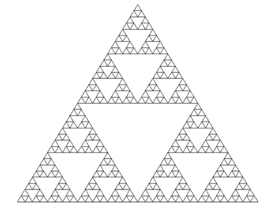 Фрактал «Кривая Серпинского»